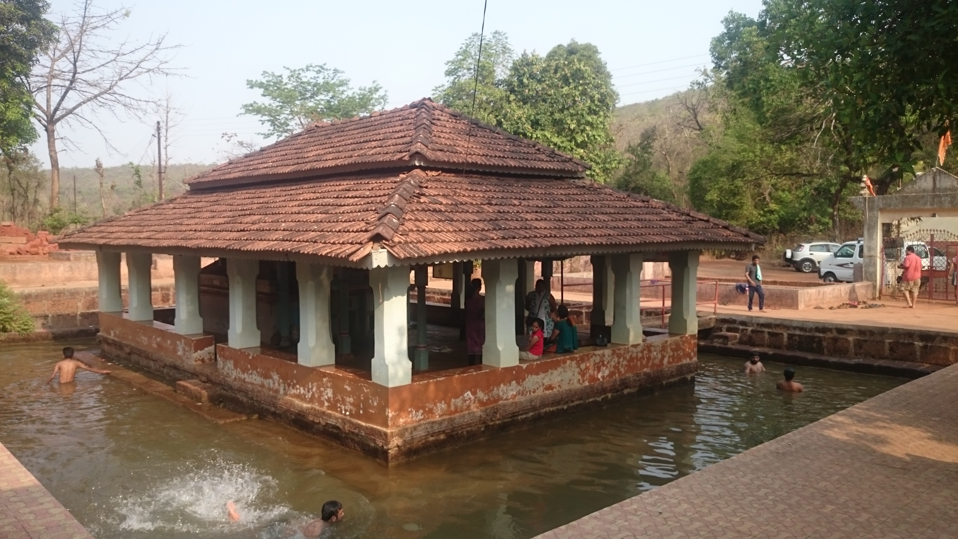 मल्लिकार्जुन मंदिर हे स्थापत्यशास्त्राचा उत्तम नमुना आहे. नैसर्गिक झऱ्याचे पाणी एका तलावात साठविले जाते जेणेकरून मंदिरातील शिवलिंग सतत पाण्यात राहते.